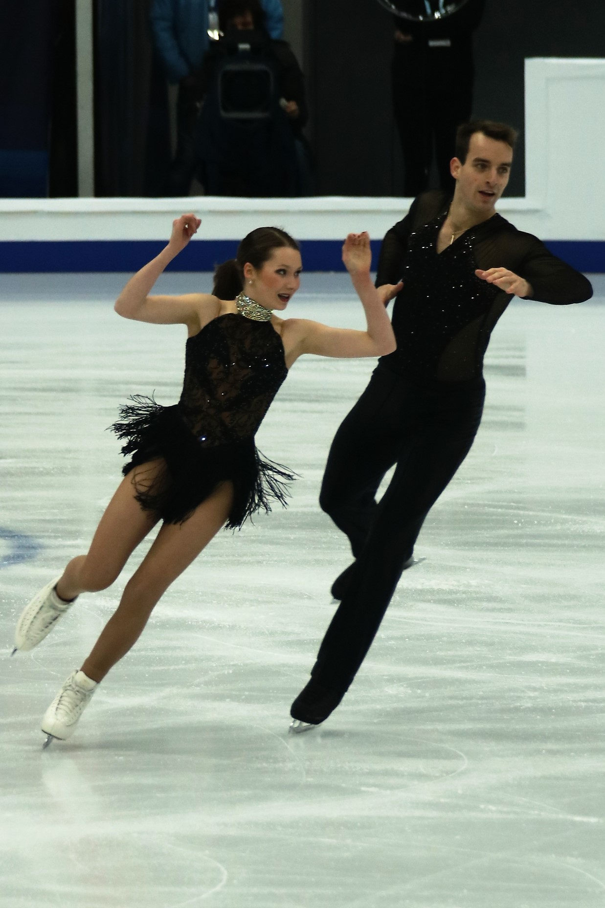 Анника Хоке и Рубен Блумаерт на Чемпионате Европы по фигурному катанию 2018